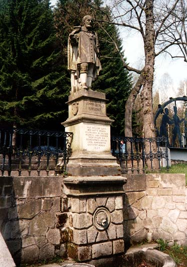 Beschreibung: Stadtgründerdenkmal in Johanngeorgenstadt, 10. Mai 2002 Quelle: selbst fotografiert Fotograf: Hejkal